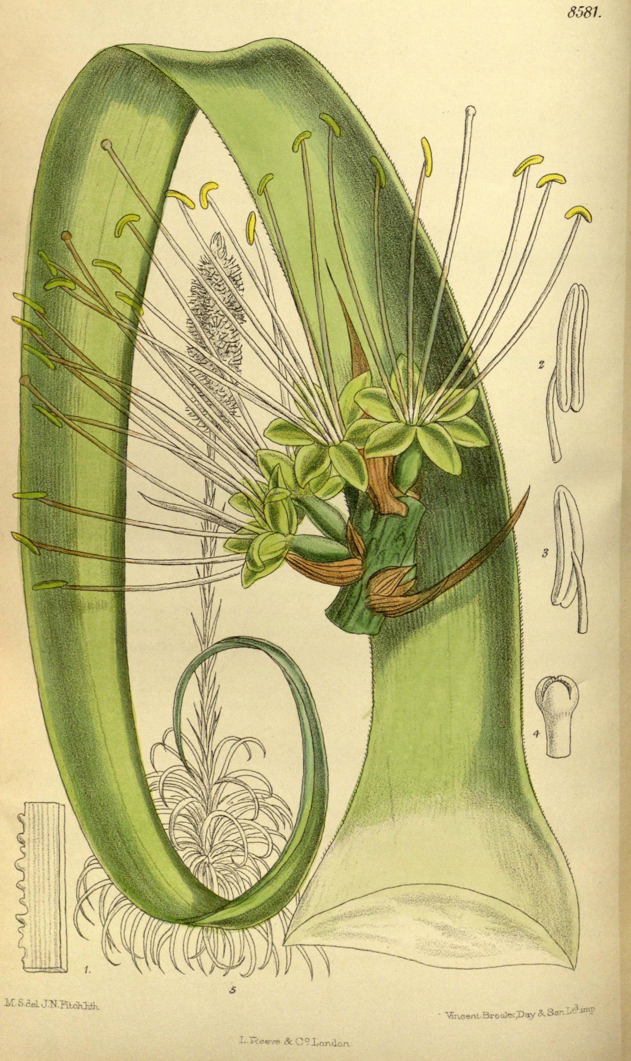 Agave bracteosa, Asparagaceae